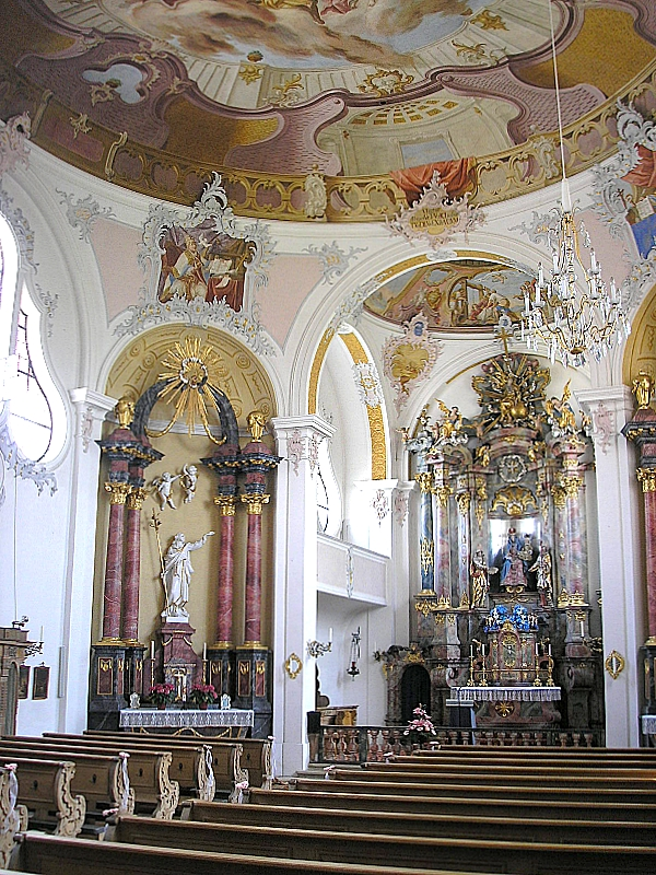 Wallfahrtskirche zu Unserer Lieben Frau (Bobingen, Landkreis Augsburg, Bayerisch-Schwaben). Chor und nördlicher Seitenaltar. Eigene Aufnahme, Okt. 2007 / Pilgrimage church of Our Lady (Bobingen near Augsburg, Bavaria, Germany). Interior, choir and northern side altar. Own photo, Oct. 2007